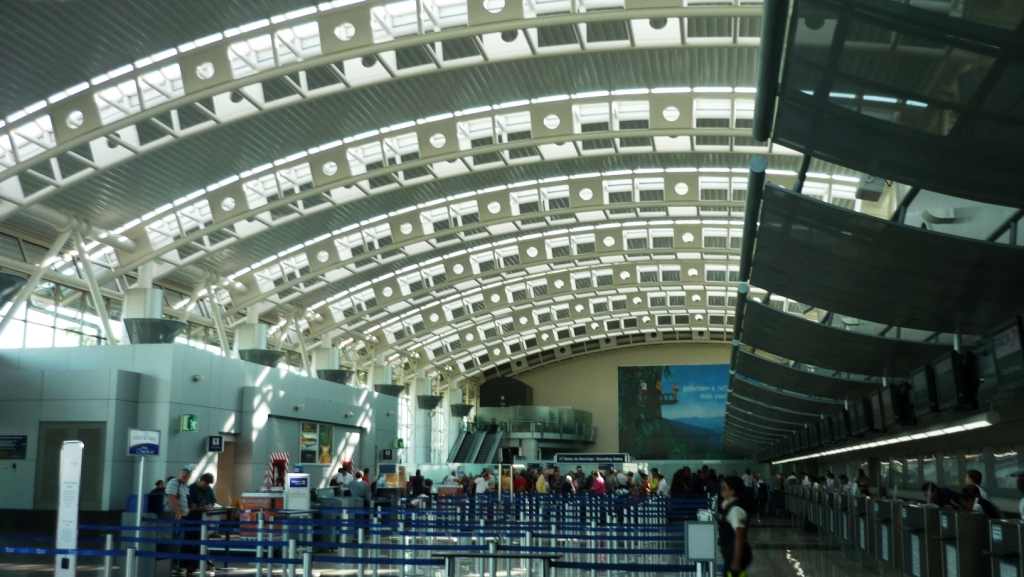 Interior del Aeropuerto Juan Santamaría, diseñado por el Arq. Javier Rojas, en Alajuela, Costa Rica